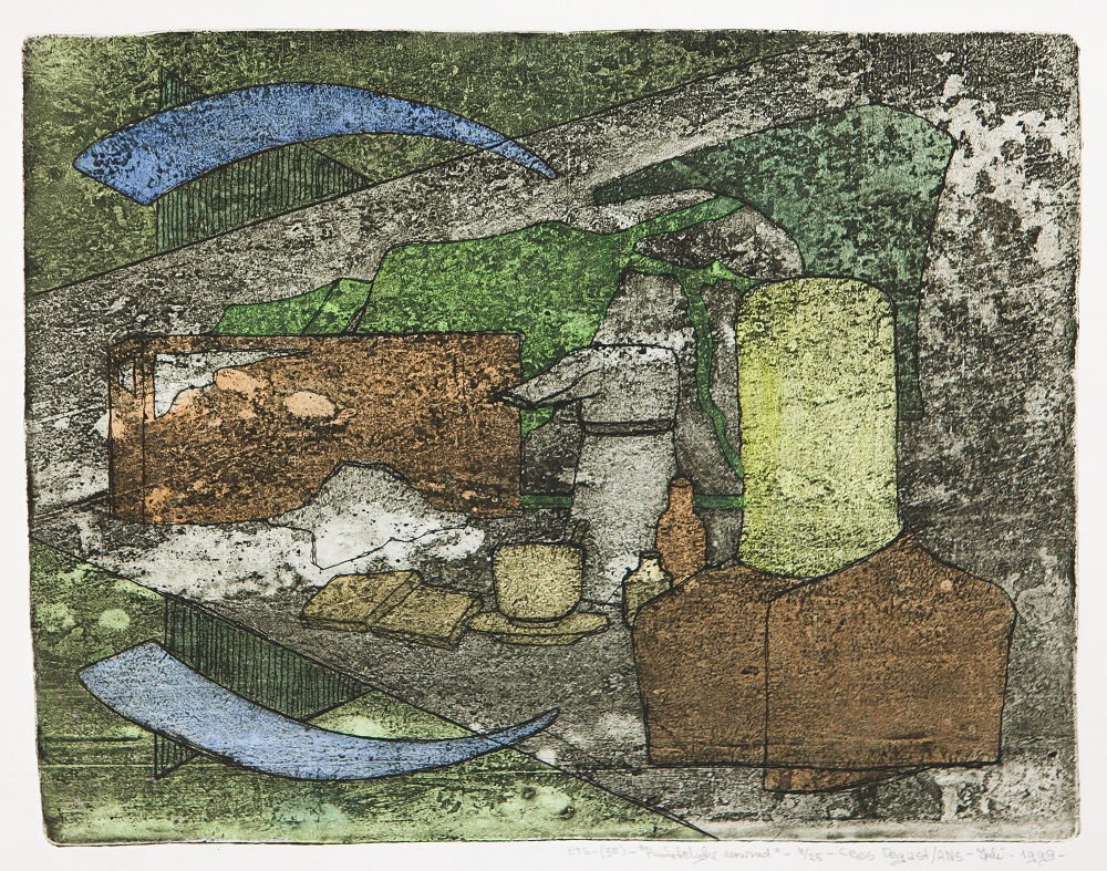 ruimtelijke eenvoud, ets genomen voor de voorpagina van het boek(je) Cees de Gast, de graficus herontdekt